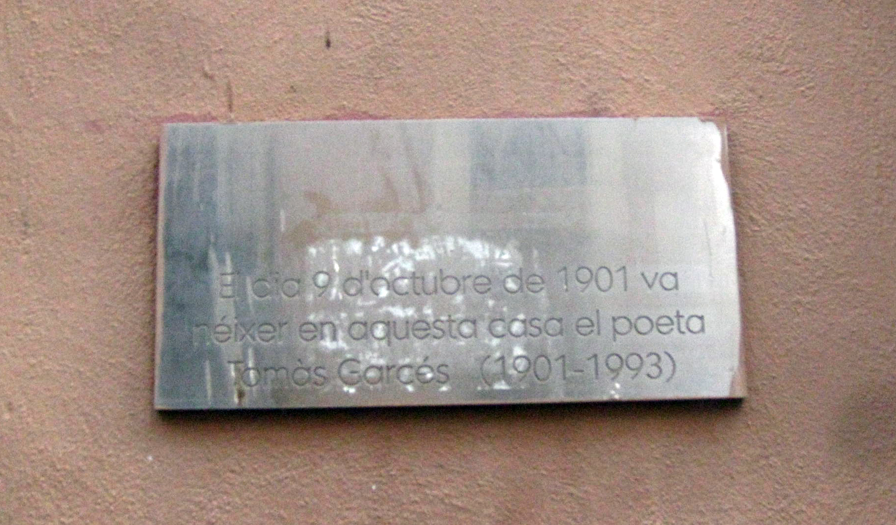 Tomàs Garcés. C. Sant Carles, 32 (Barcelona)